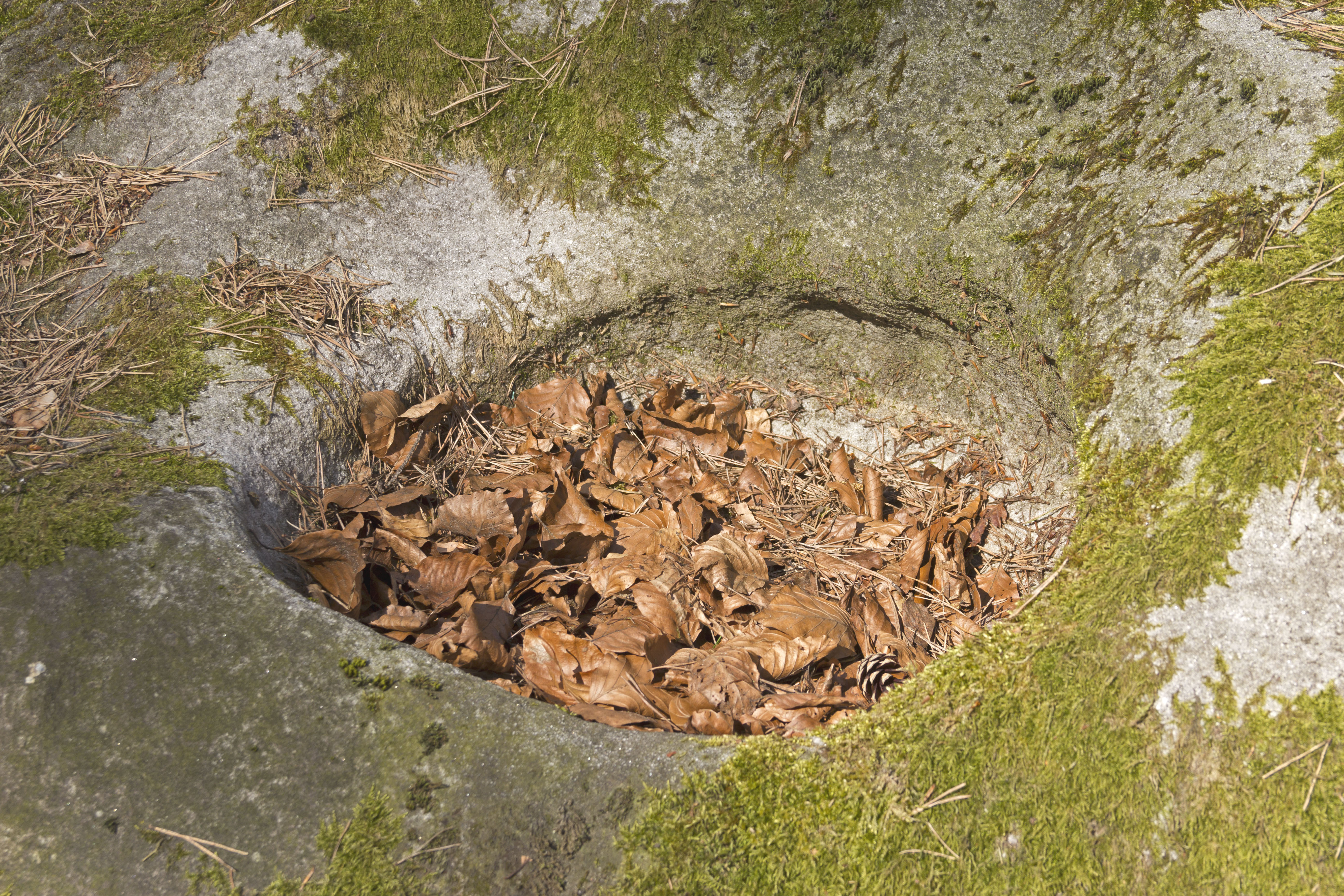 Kallmünzer, Zyprianstein, Geotop, Rinnenbrunn, Naturpark Fränkische Schweiz-Veldensteiner Forst, Kolk